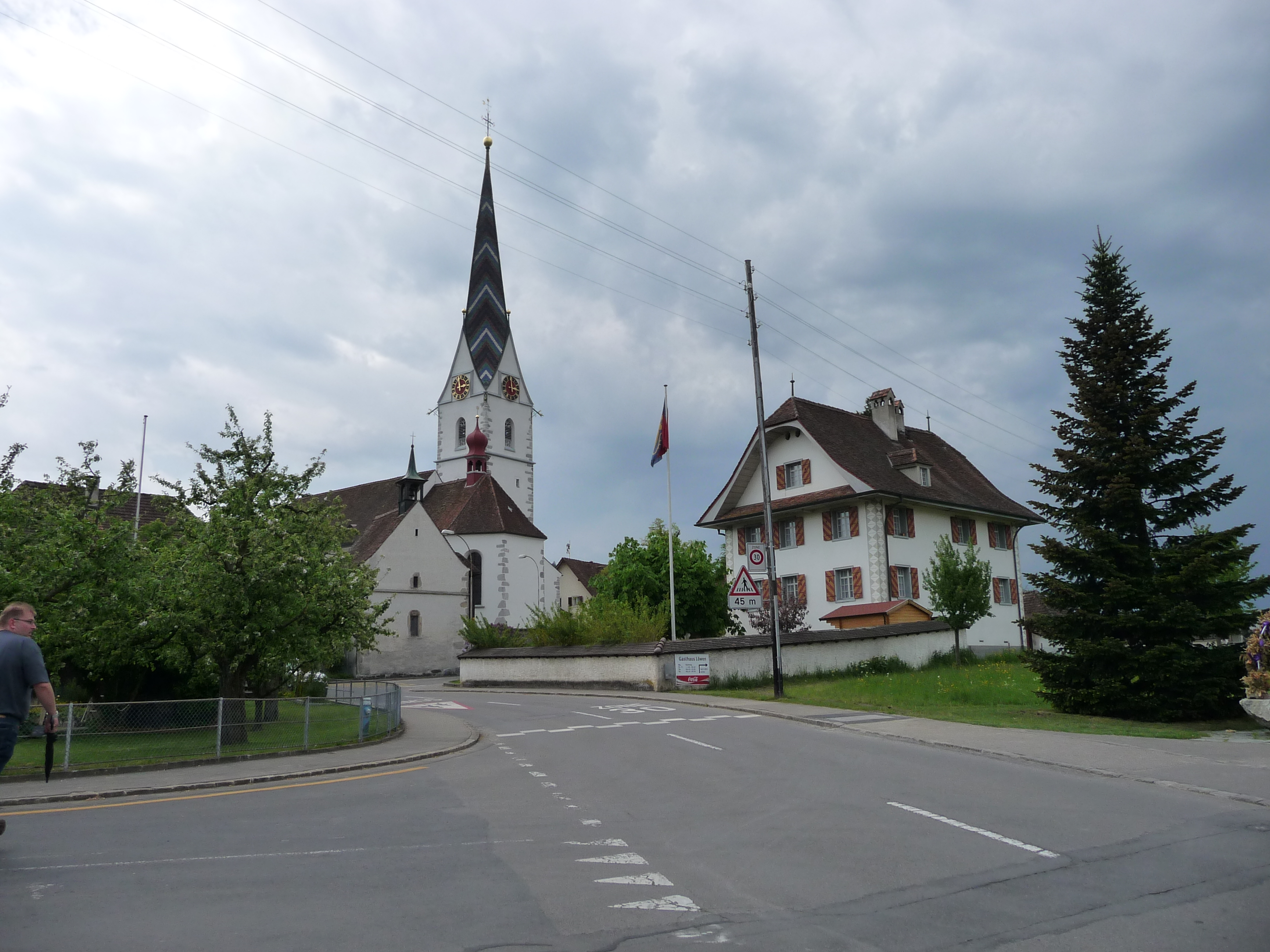 Pfeffikon